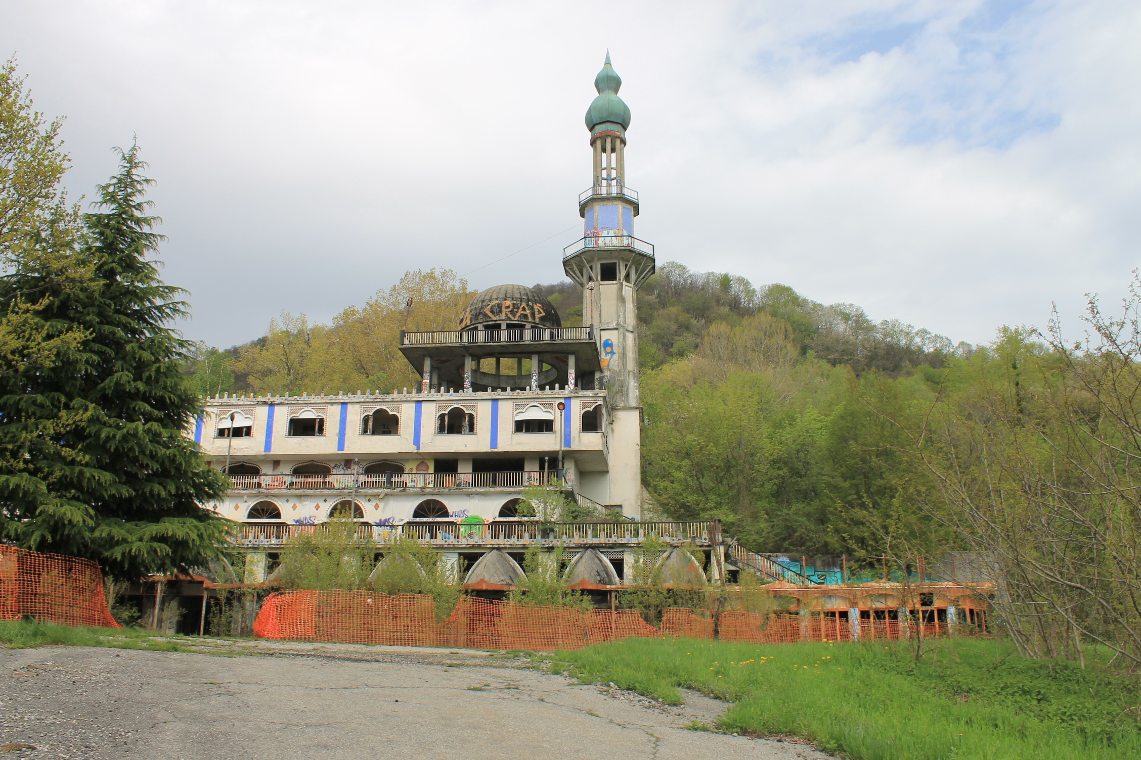 Minareto